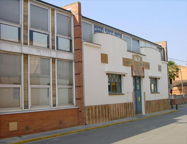 Edifici de nova planta destinat a escola i ajuntament